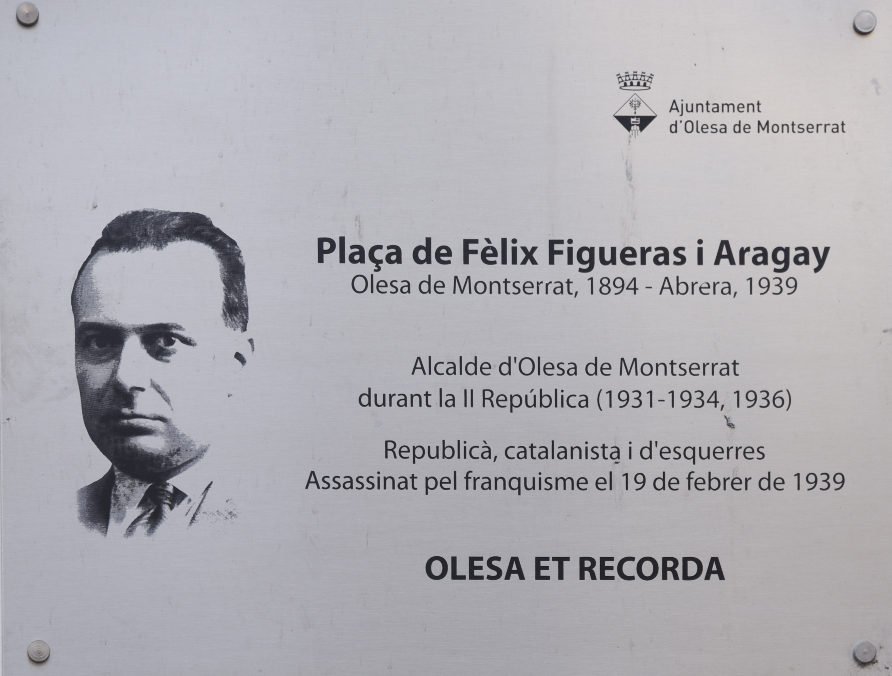 Straßentafel Placa de Felix Figueras i Aragay